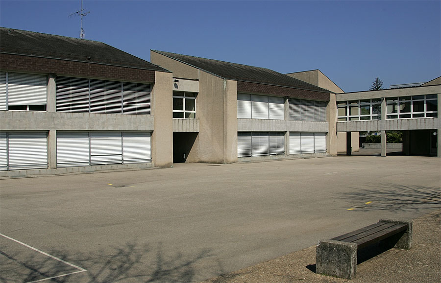 Oberstufenschulhaus in Collonge